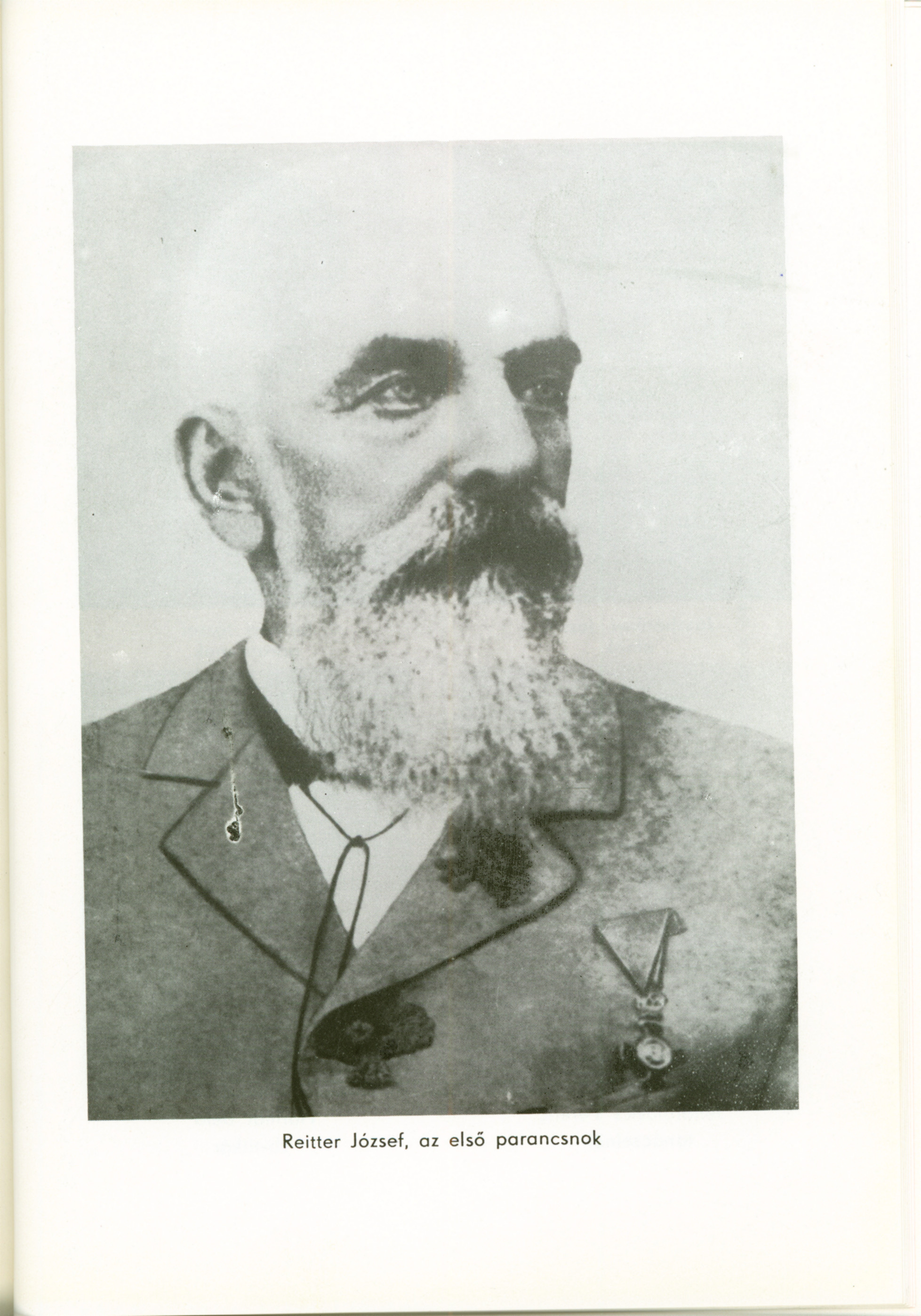 Reitter József